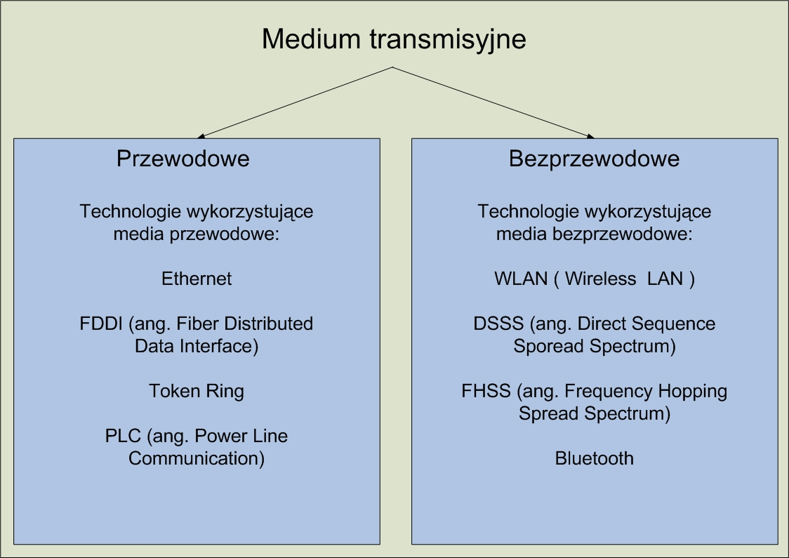 Schemat przedstawia rodzaje medium transmisyjnego używanego w sieciach zbudowanych w oparciu o różne technologie. Autor: Michał Klimek, Data: 19.01.2007